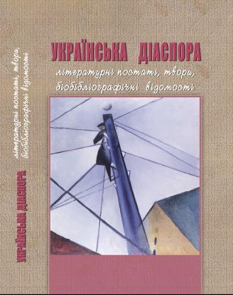 Фото